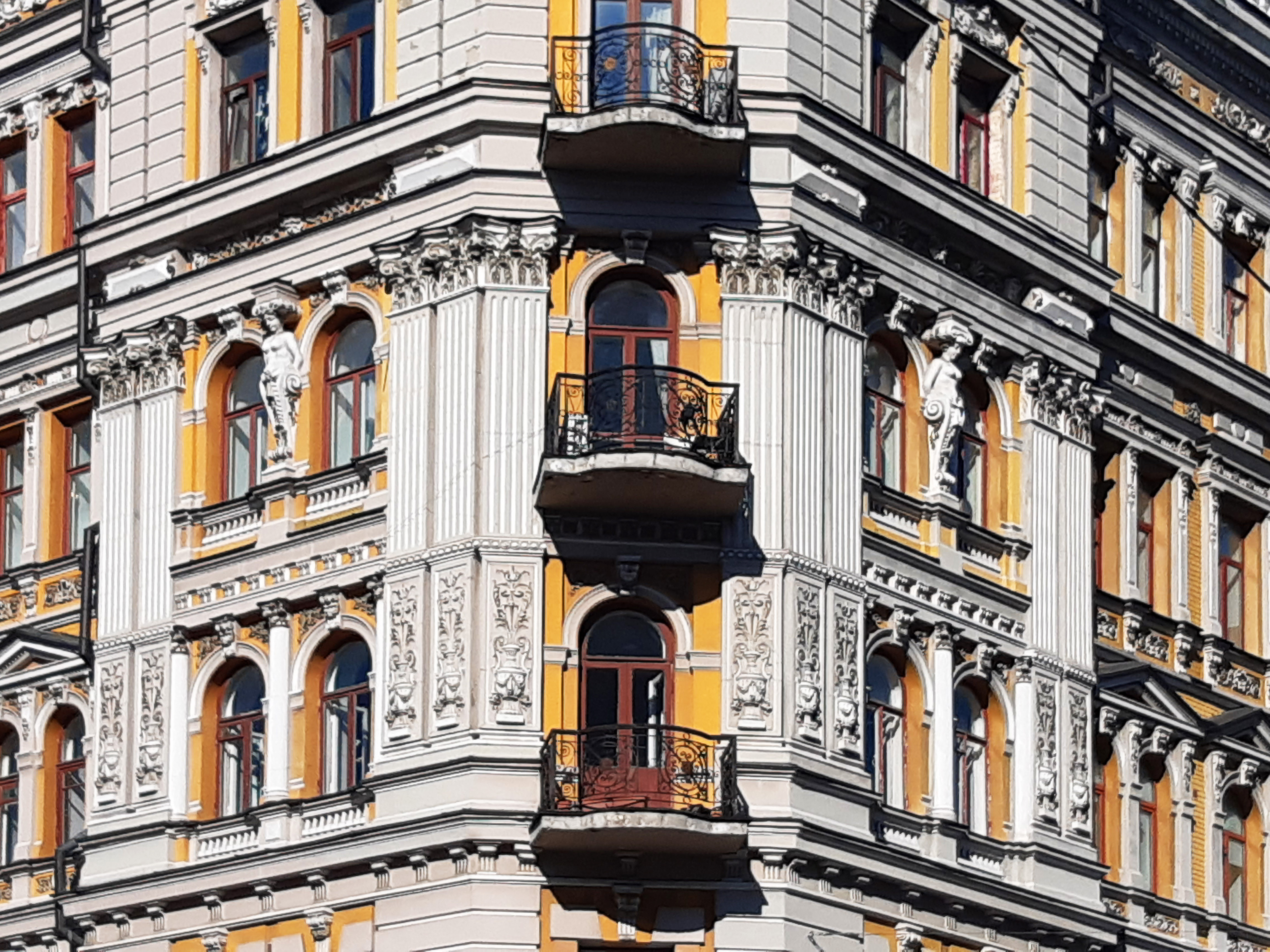 Жилий будинок, Київ, вул. Б. Хмельницького, 30/10